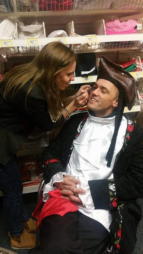 Is getrokken in Sas van Gent 2015